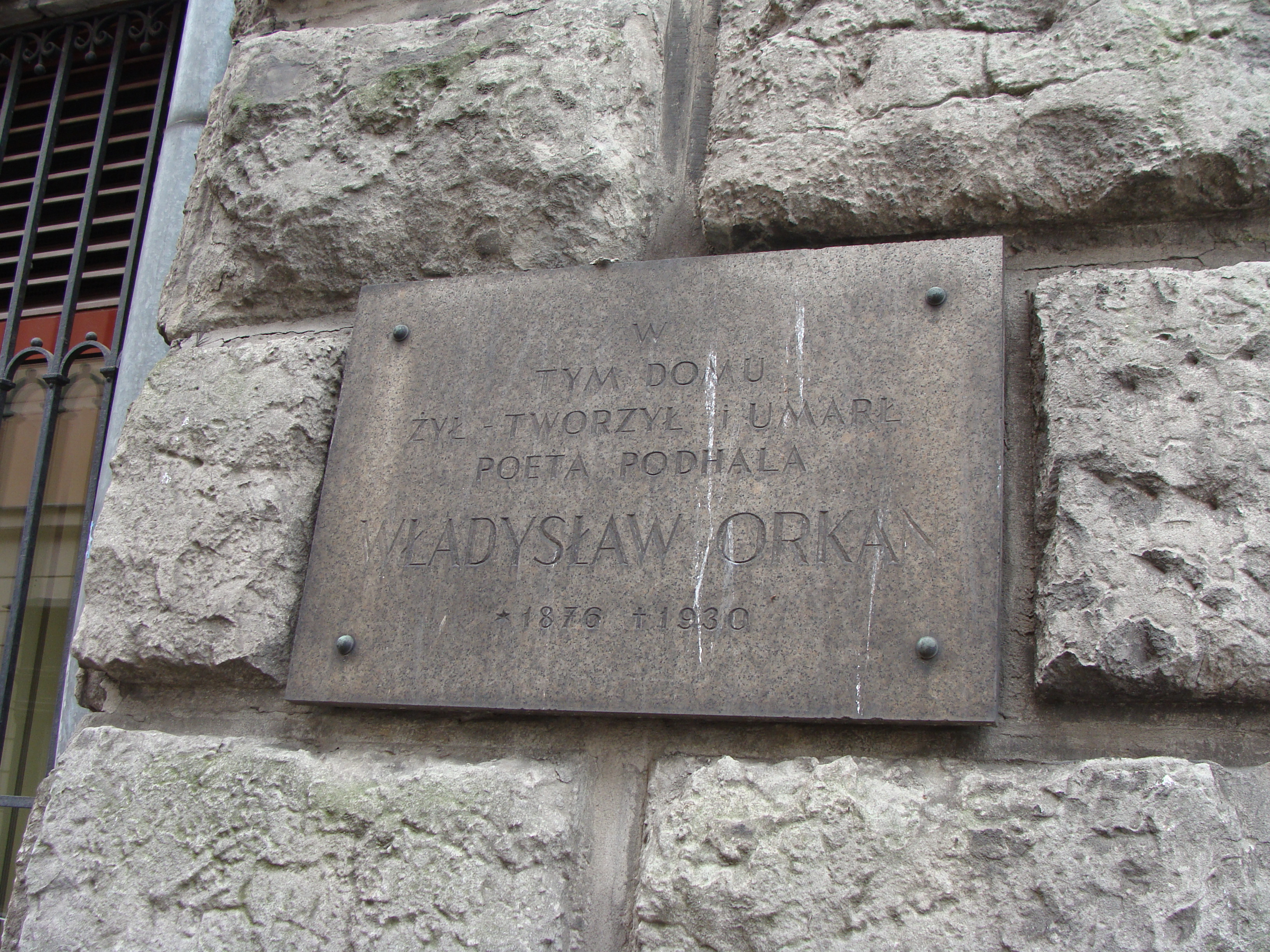 Władysław Orkan Tablica Kraków